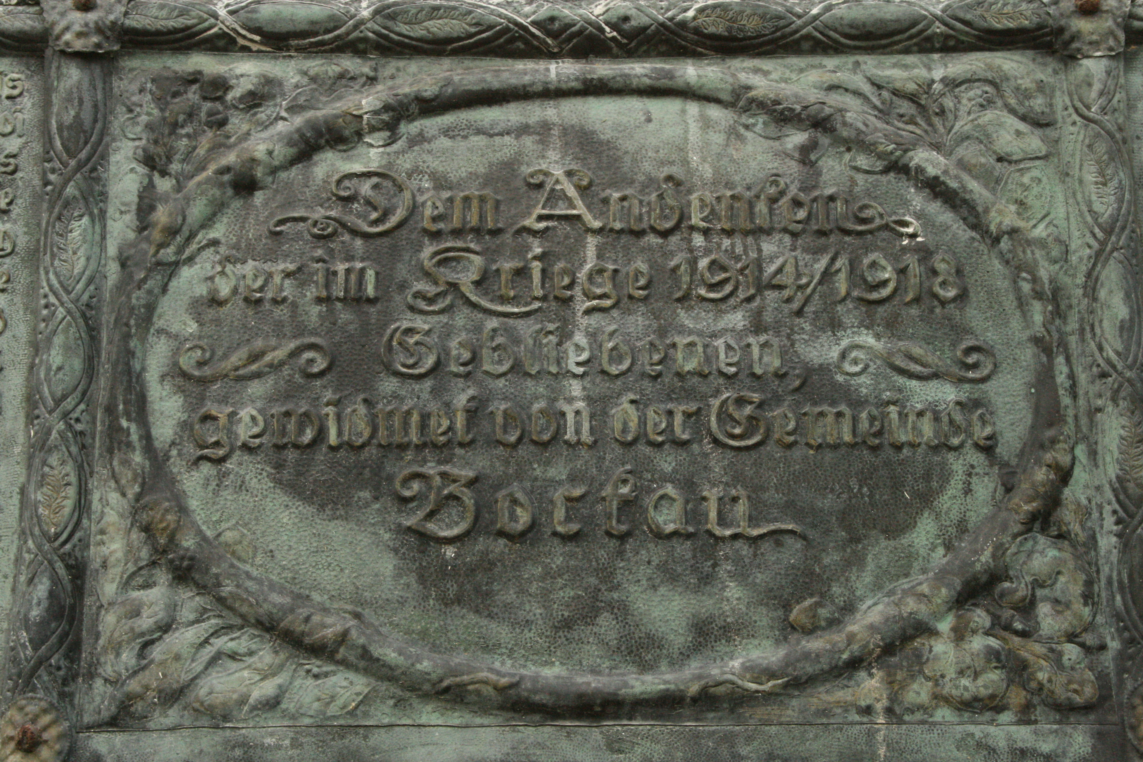 Für die große Zahl der Gefallenen und Vermißten des 1. Weltkrieges aus Bockau wurde an der Außenseite der Kirche eine Gedenktafel angebracht: „Dem Andenken der im Kriege 1914/1918 Gebliebenen, gewidmet von der Gemeinde Bockau“